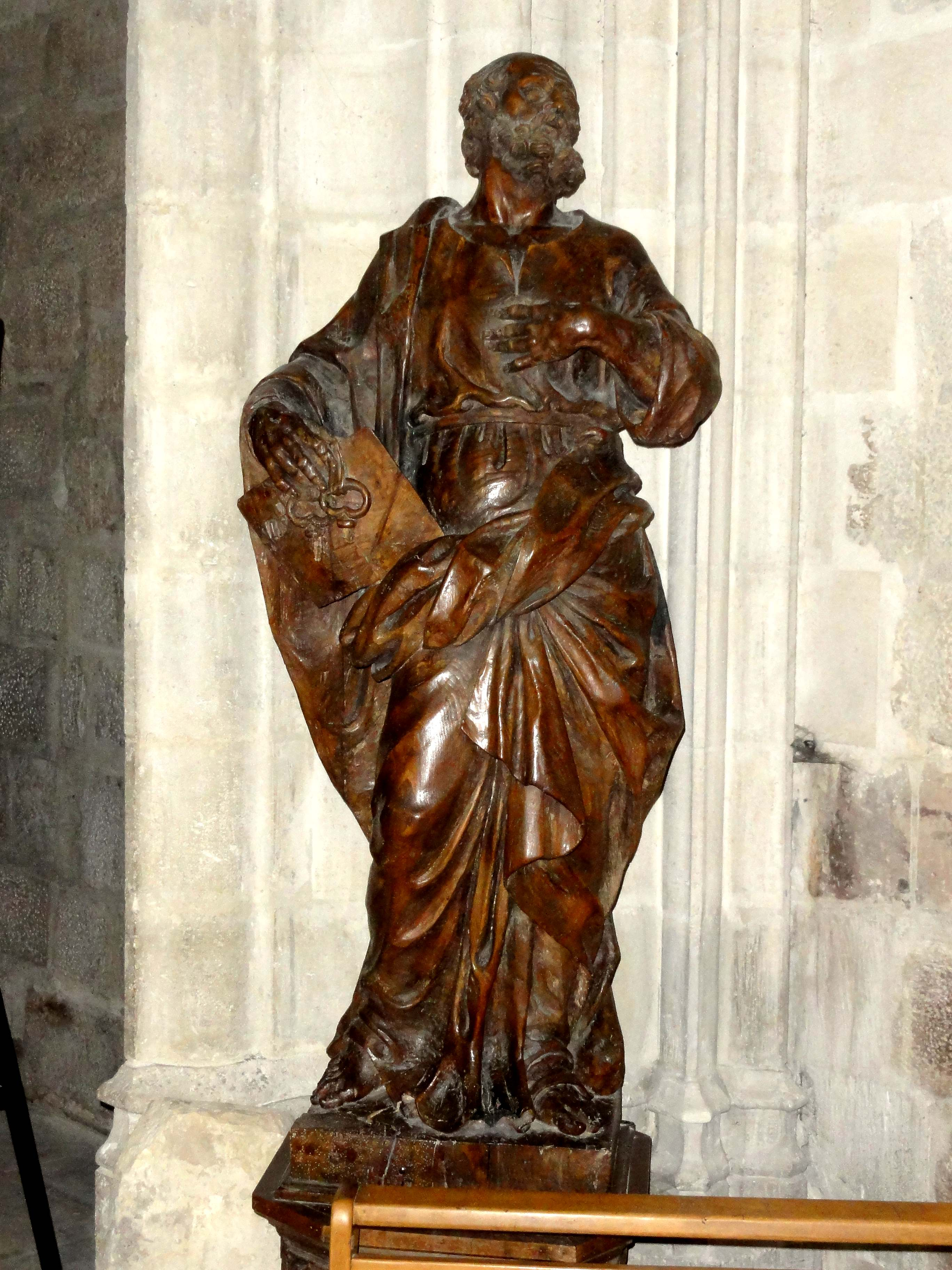 Voir titre.